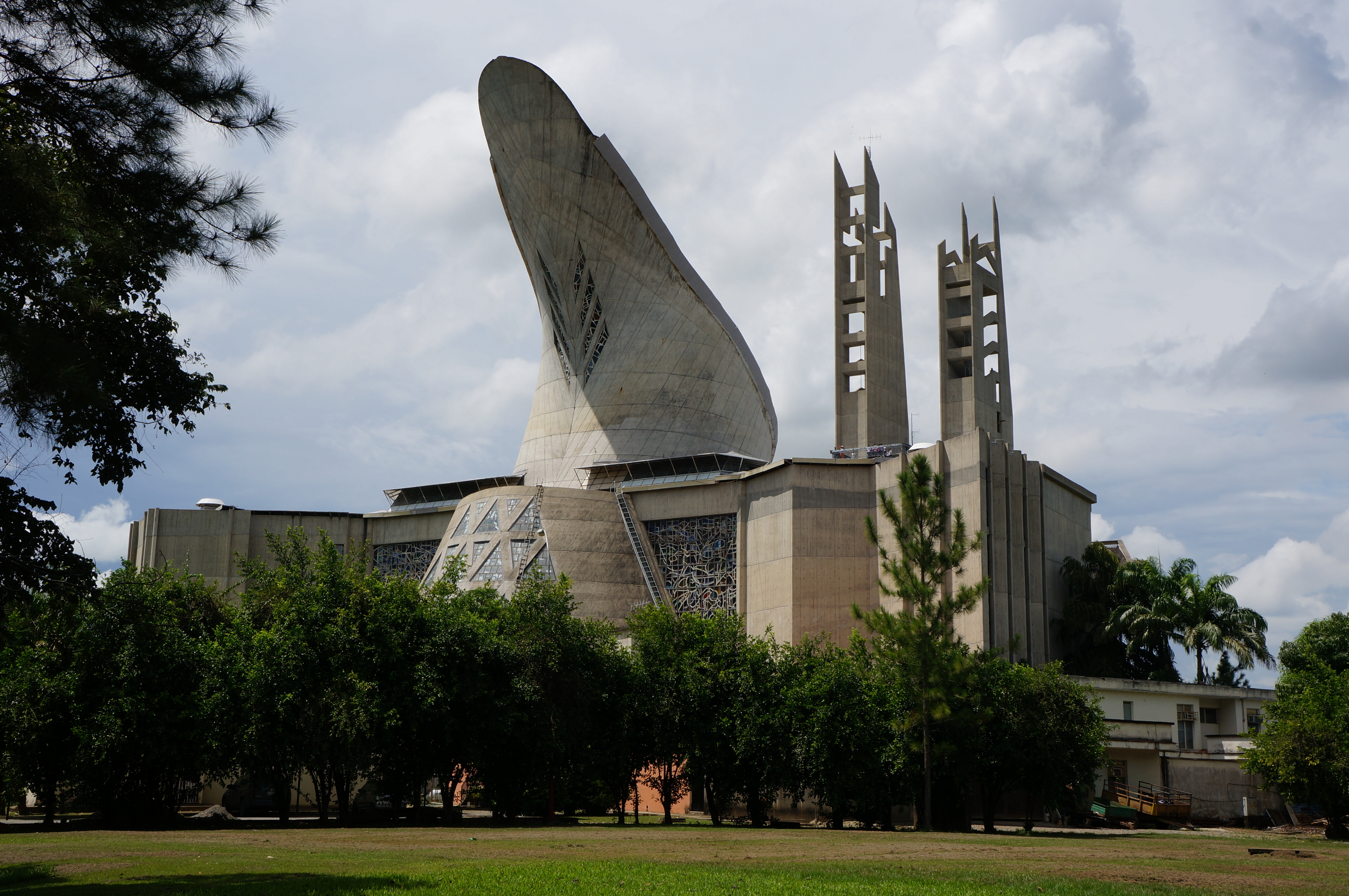 Vista de la Doble Hiperboloide Eliptica del Santuario, Guanare, Estado Portuguesa